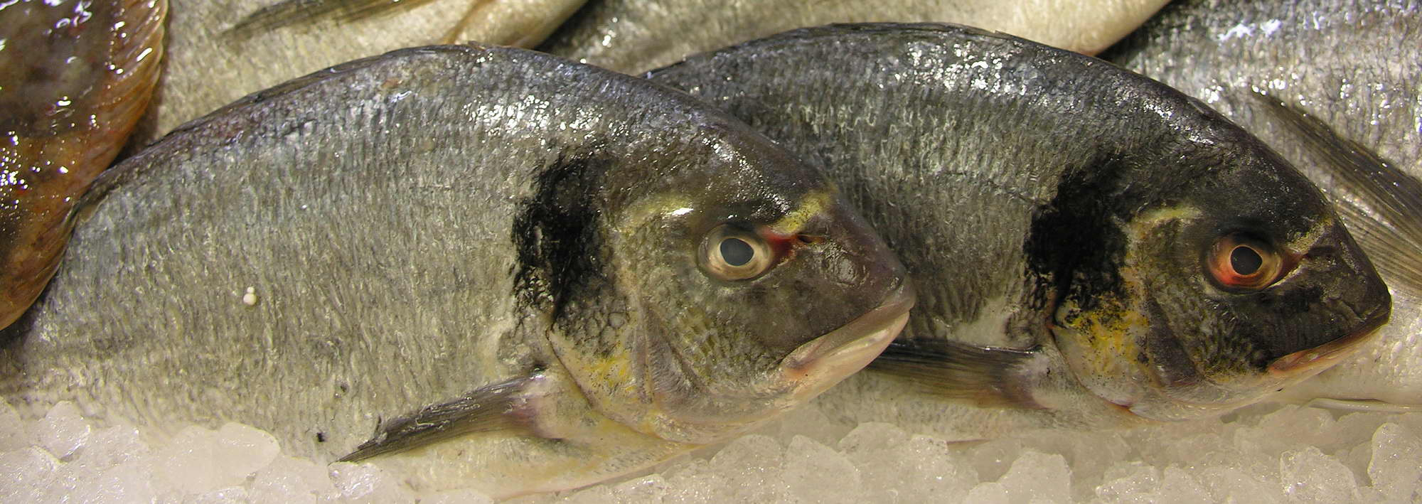 Douradas á venda en Santiago de Compostela. Galicia. España